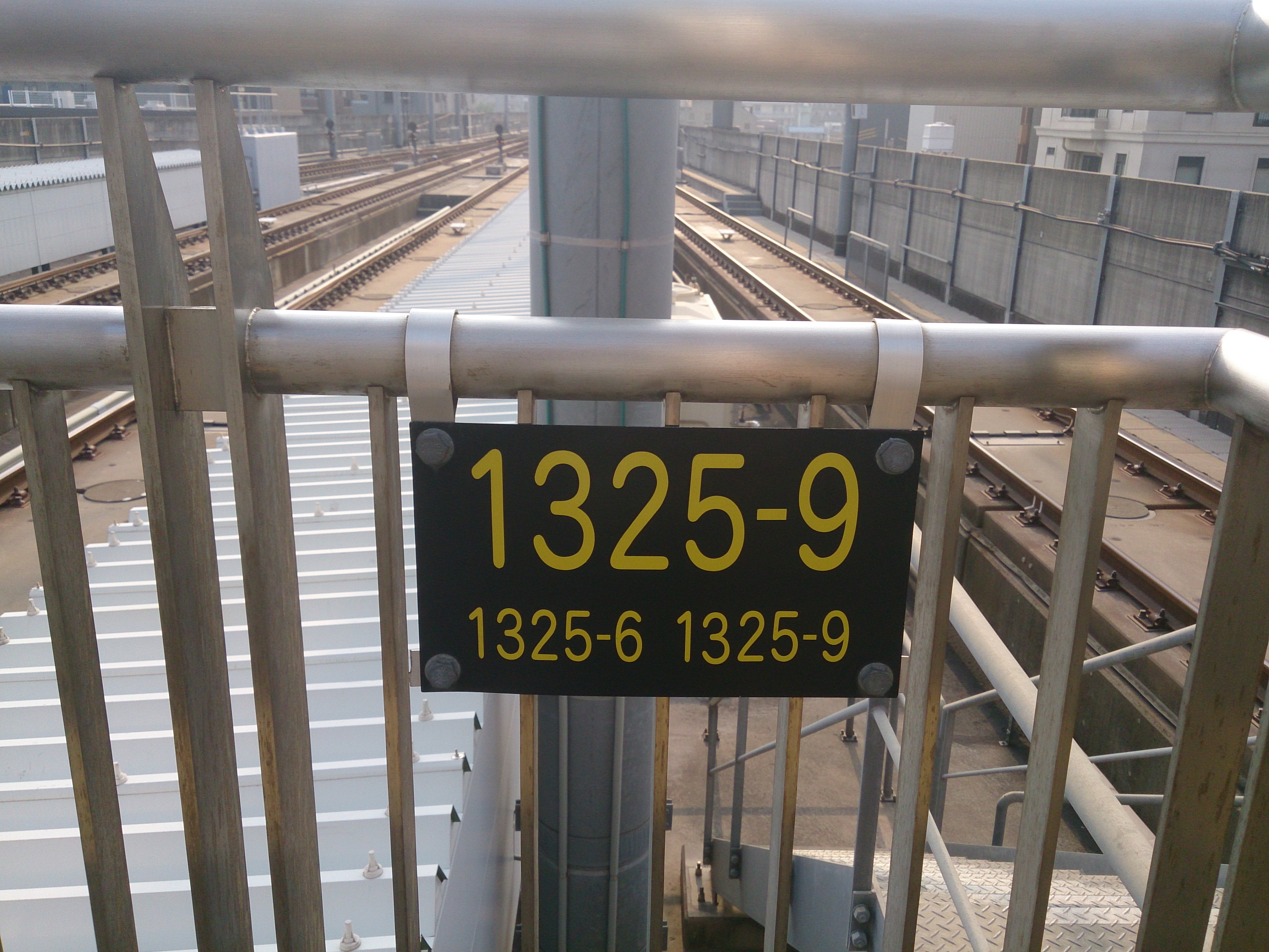 鹿児島中央駅 新幹線キロポスト